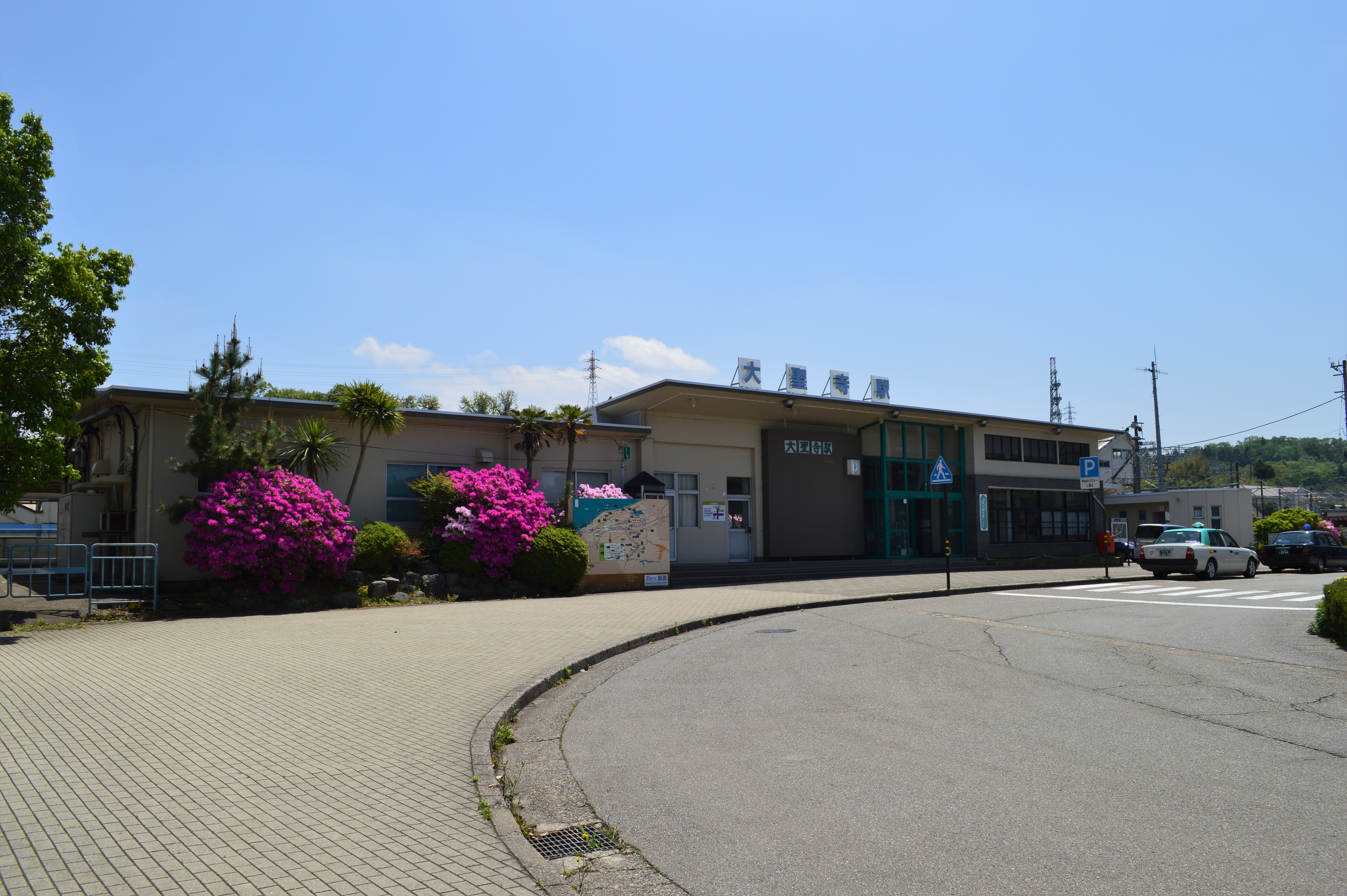 大聖寺駅 駅舎